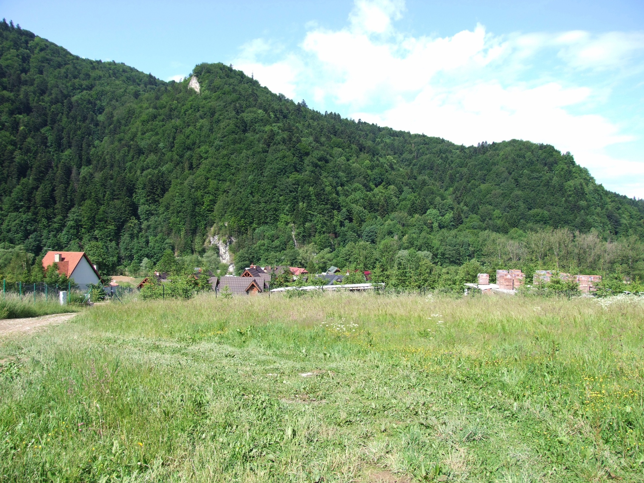 Pieninki.Na środku Kurnikowa Skała, pod nią skała Zawiesy. Po prawej stronie Żleb Żłobina i grzbiet Koszarków z wzniesieniem bez nazwy